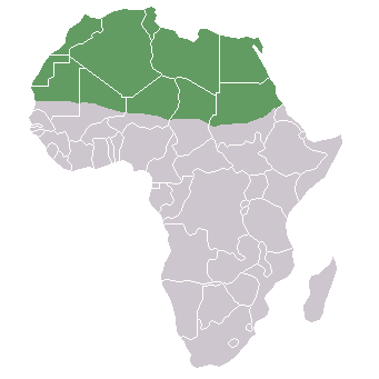 Afrika nördlich der Sahara (Weißafrika) Northern Afrika (White Africa)